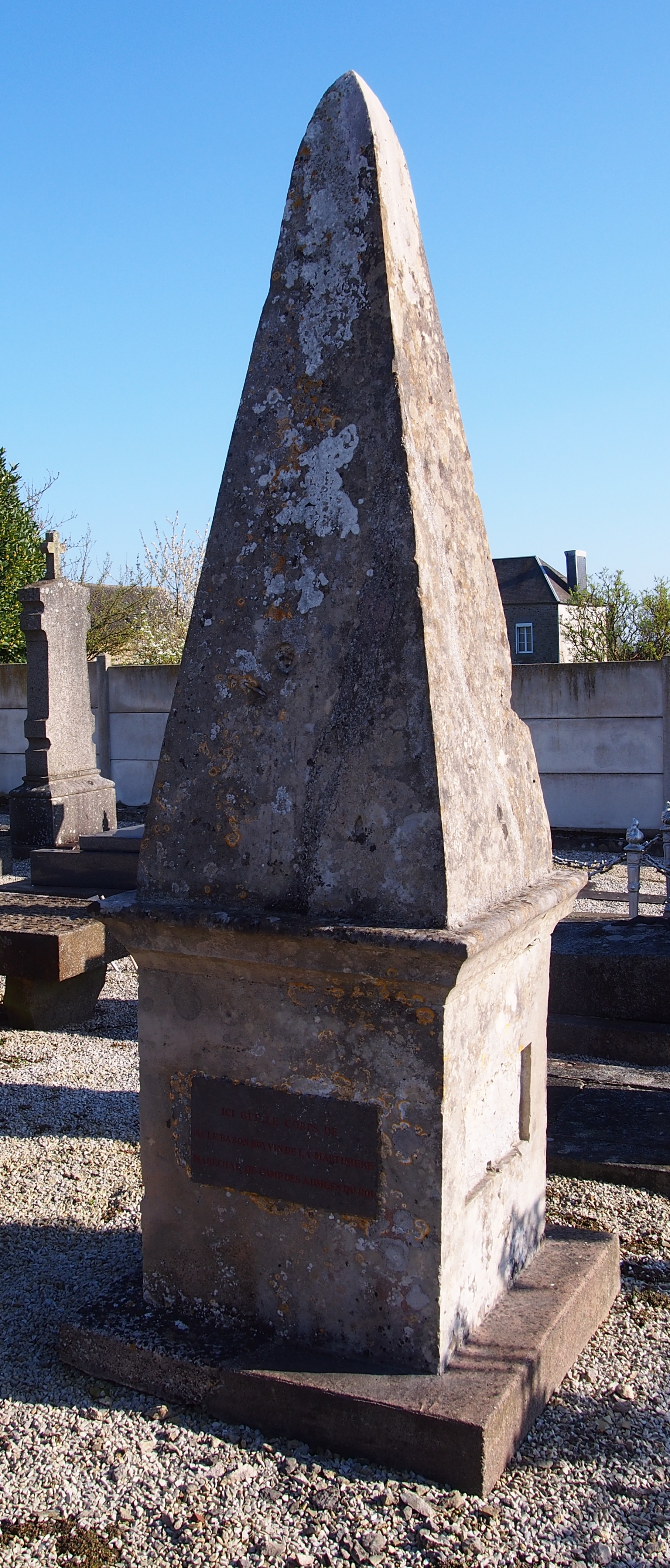 Rully (Normandie, France). La pierre sépulcrale du baron Guillaume Boivin de La Martinière.